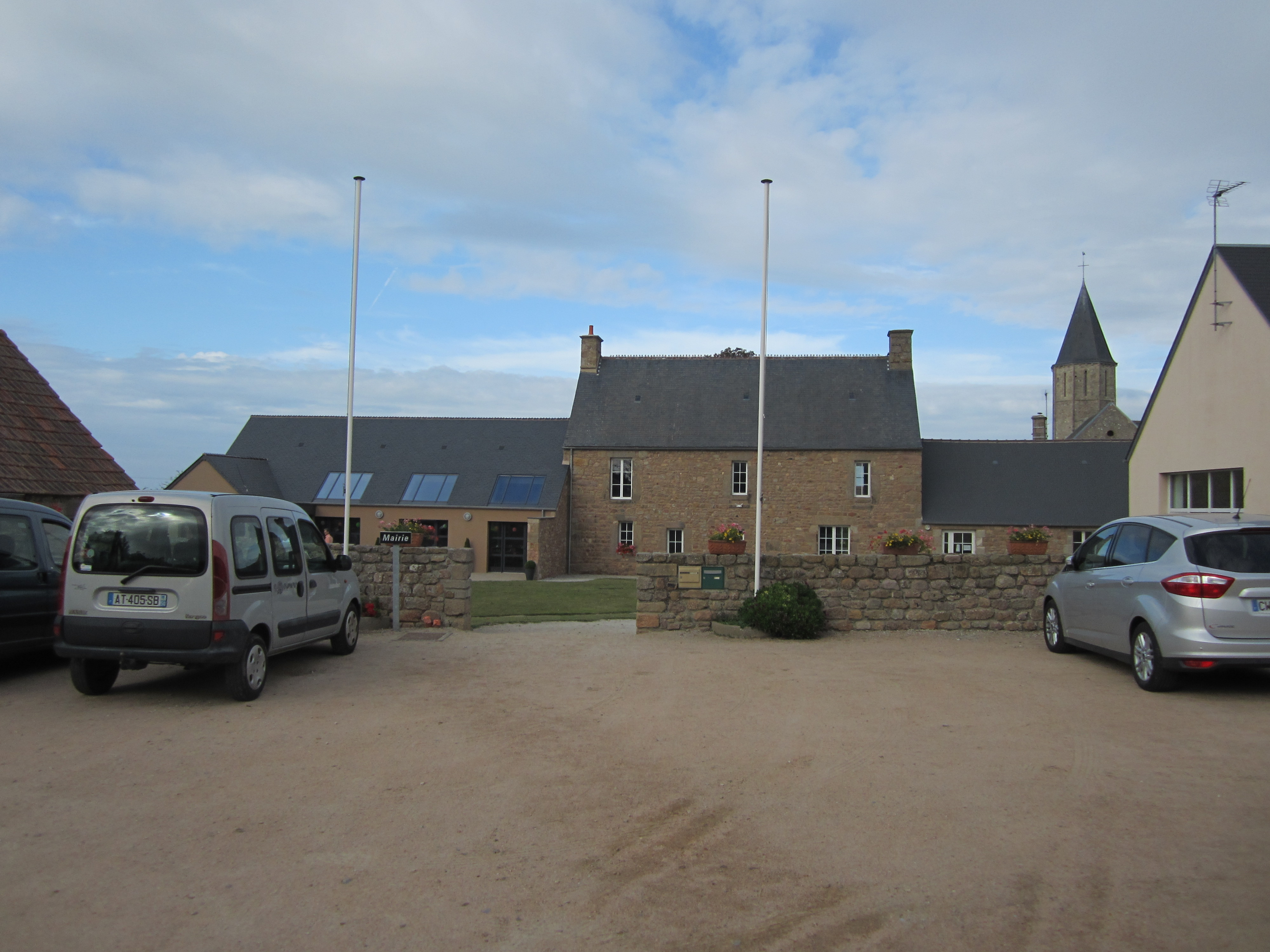 Cosqueville, Manche